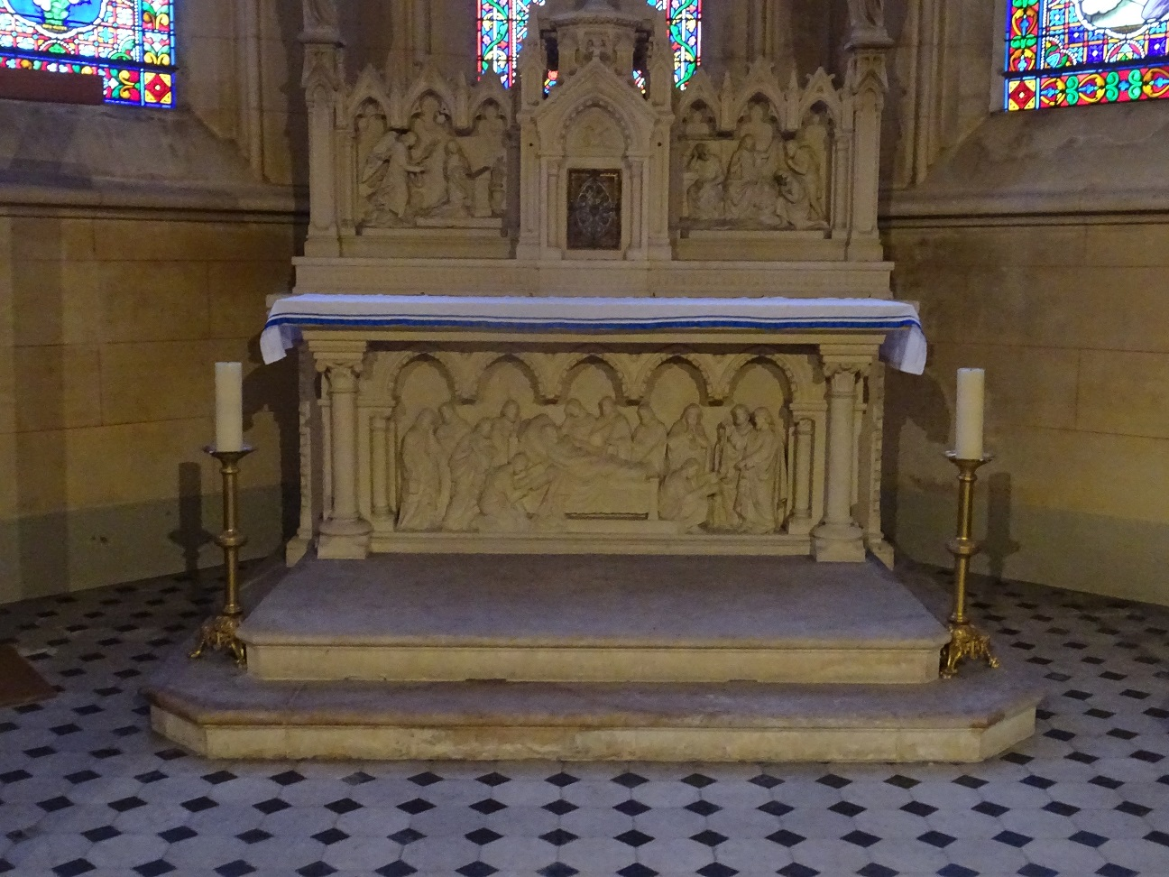 Maromme (Seine-Maritime, France), Autel de la Vierge dans l'église Saint Martin